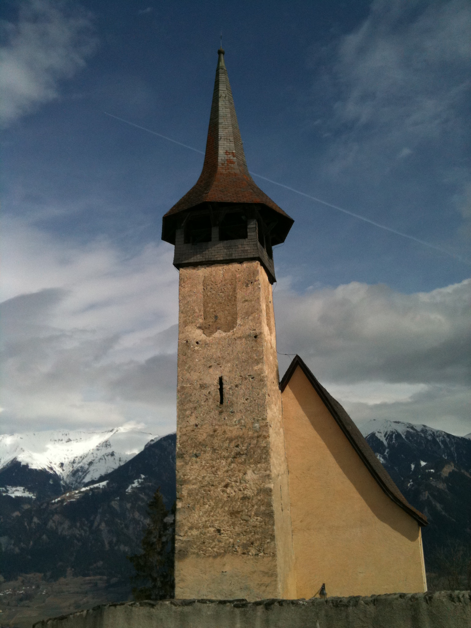 reformierte Kirche Flerden (Heinzenberg, Kanton Graubünden) mit markantem Turm